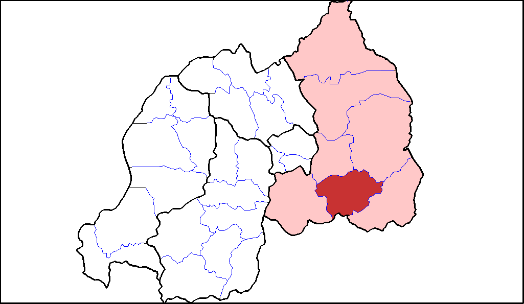 Distretto di Ngoma.